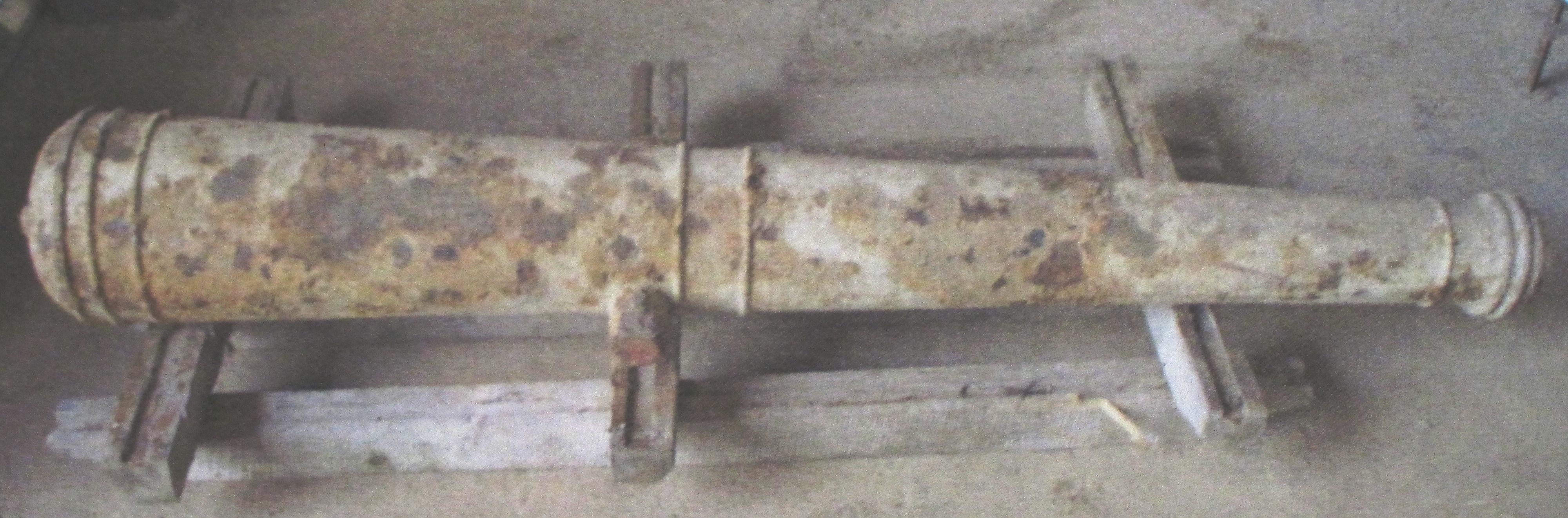 Гармата з Нясьвіжскага замку, затопленая шведамі ў замкавым рове